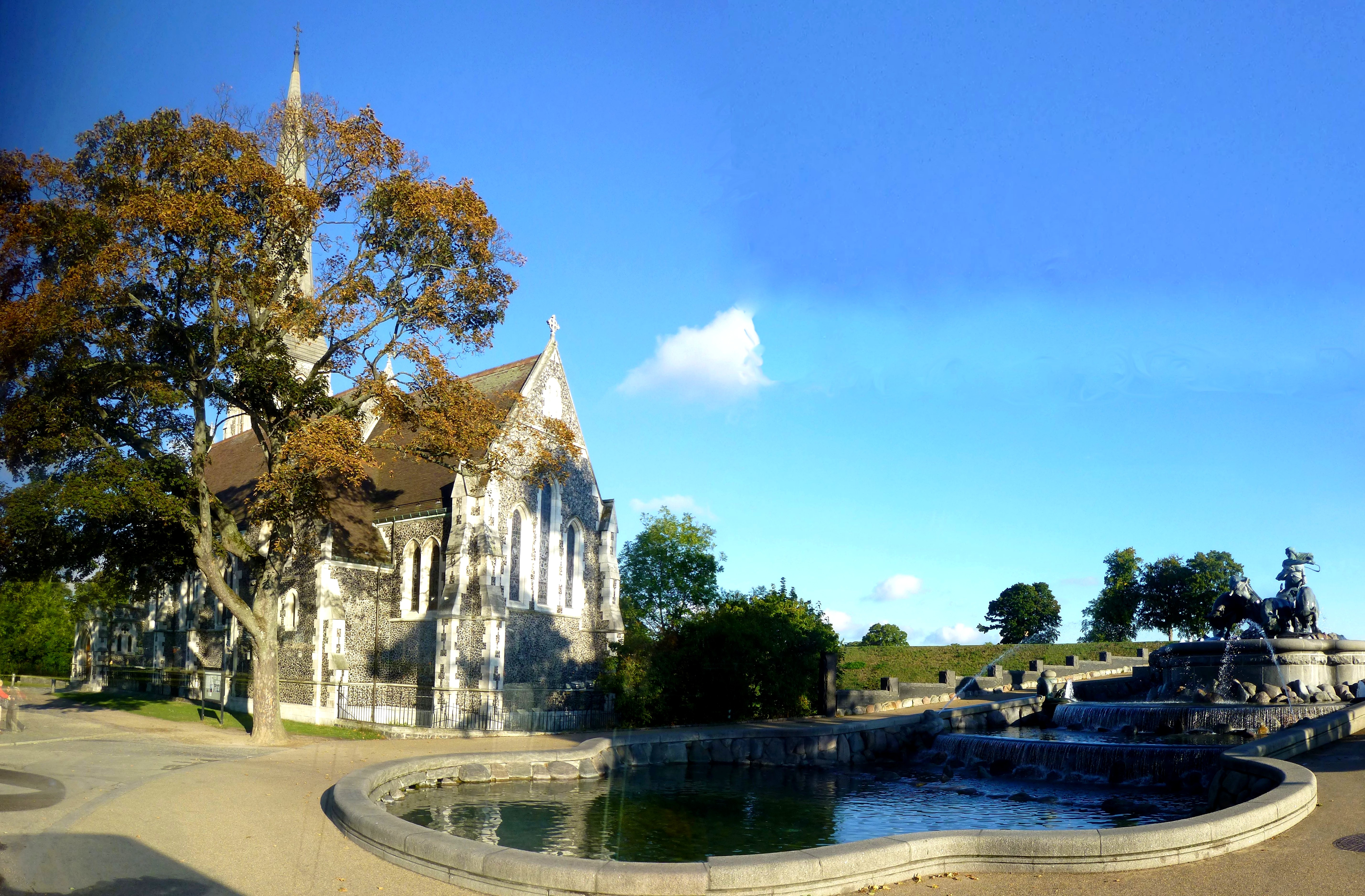 Kopenhagen - Gefion-Brunnen und anglikanische Kirche St Alban - Gefionspringvandet og St. Albans Anglican Church